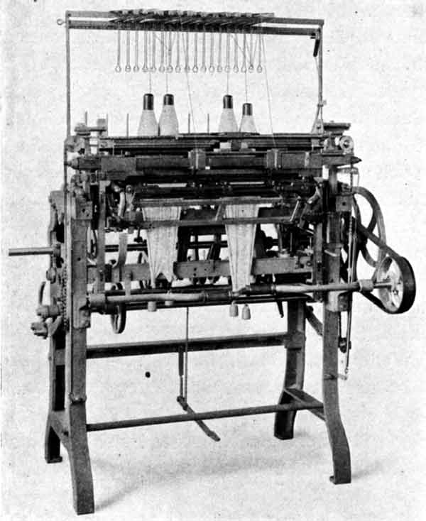 Paget-Stuhl Baujahr 1870